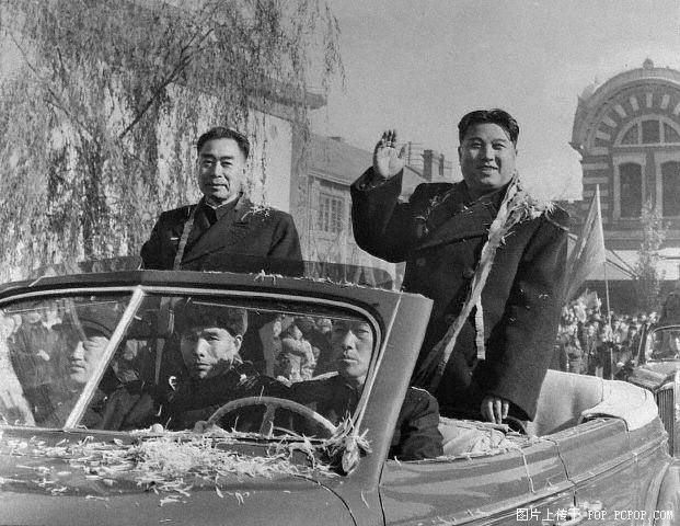 1958年 周恩来陪同金日成游览北京城